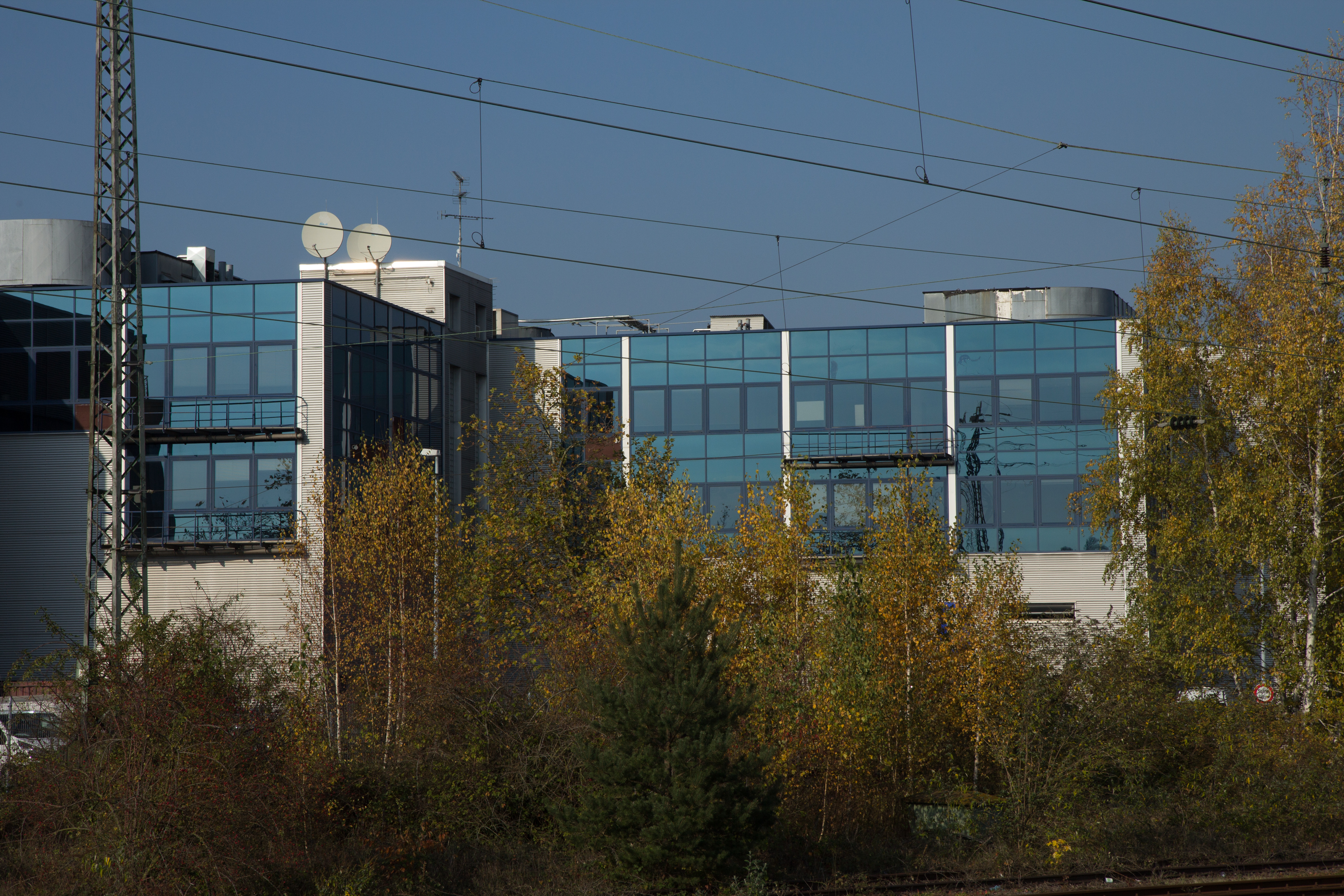 MP Medienparks NRW GmbH in Hürth